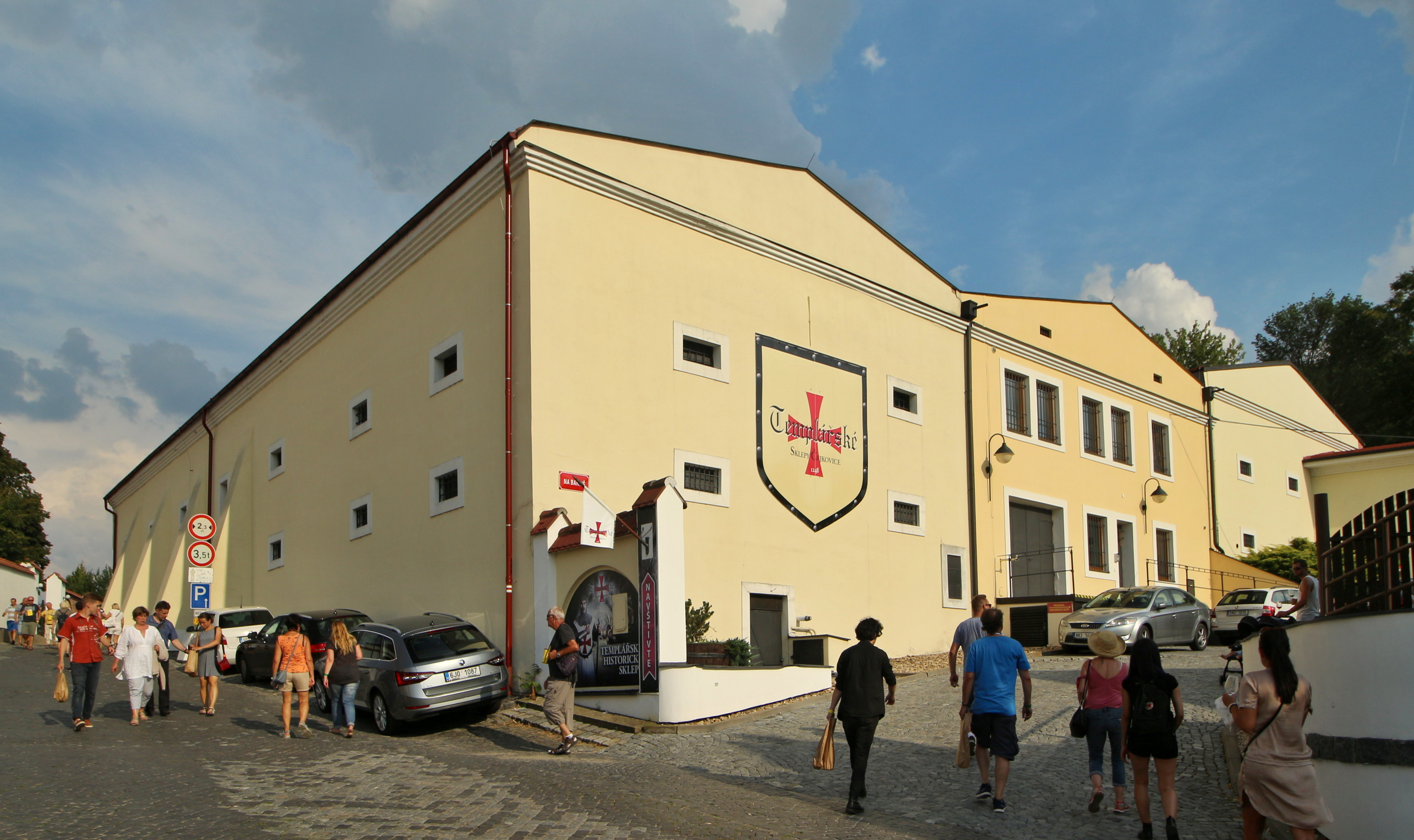 Čejkovice templářské sklepy